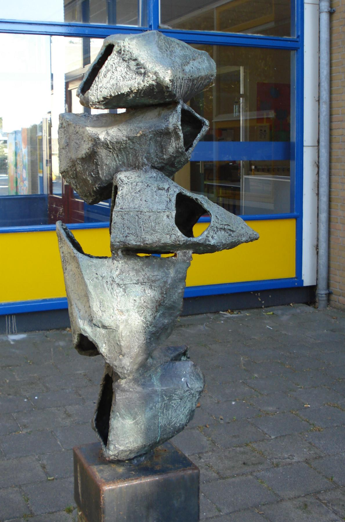 Rotterdam Hoogvliet, Lengweg. Kunstwerk "Spacebulbs" van Leendert Janzee. Rotterdam/The Netherlands.